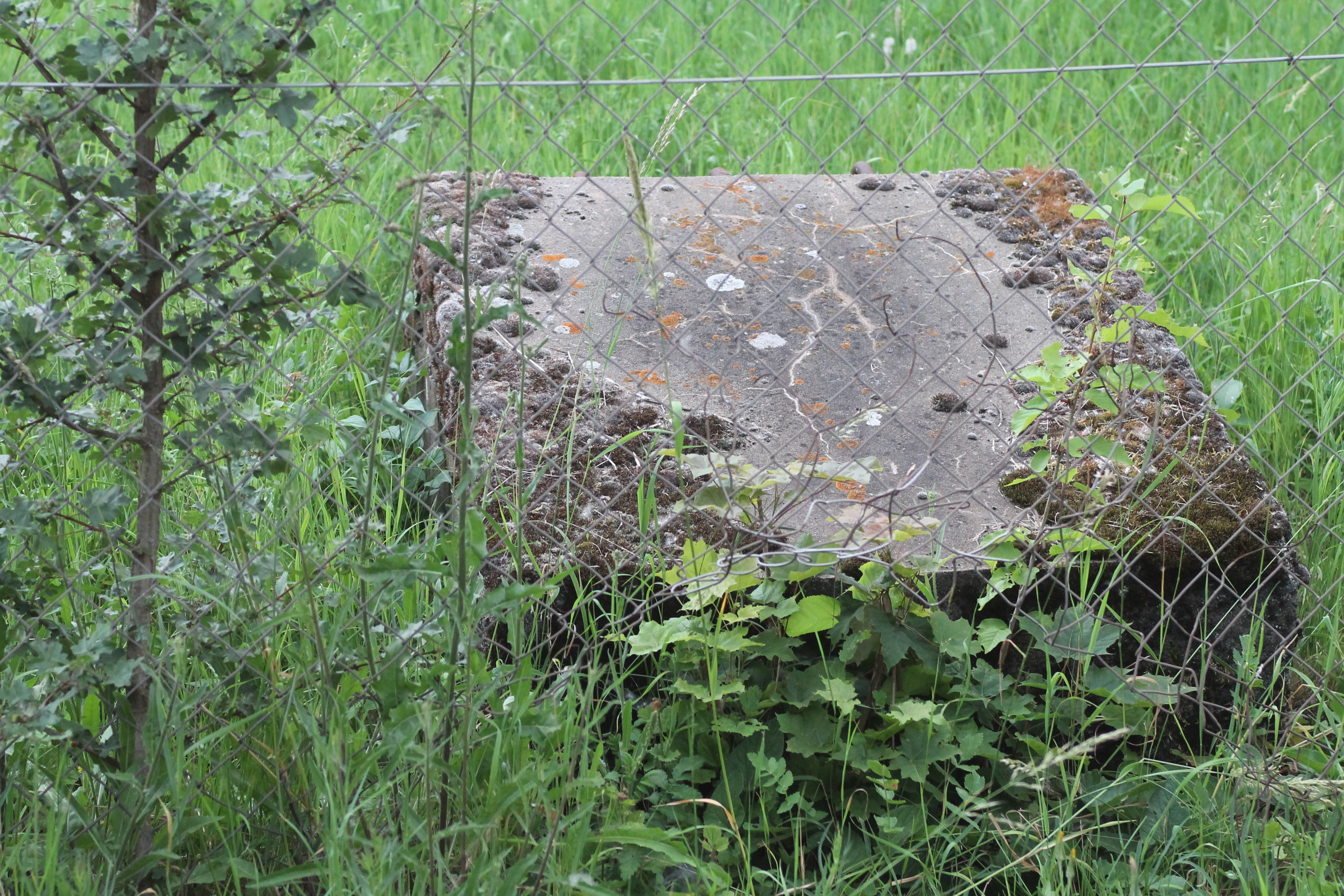 Abspannfundament eines einstigen Sendemastes beim Richtfunkturm Würzburg-Frankenwarte